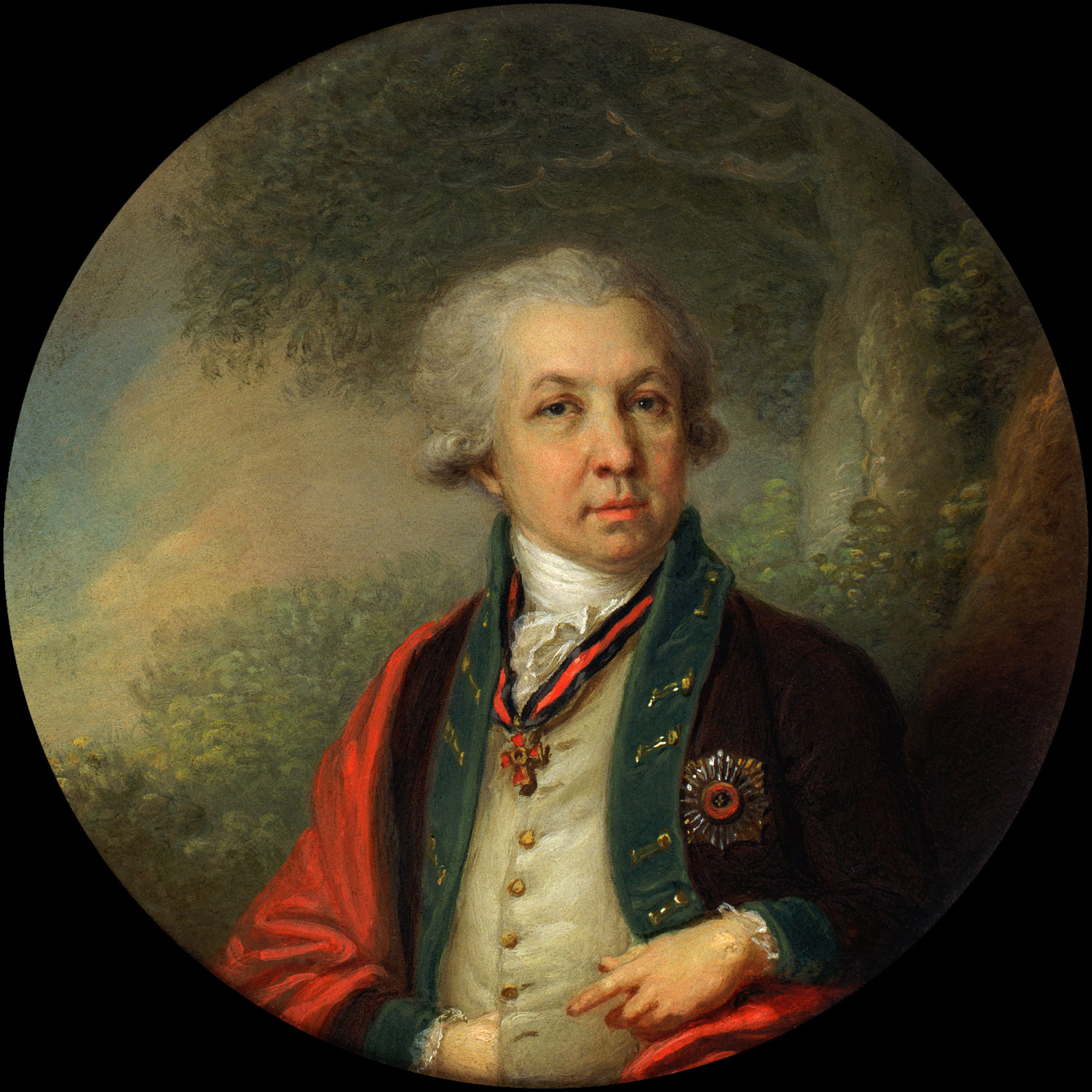 Портрет Гавриила Романовича Державина, в мундире Екатеринославского наместничества.